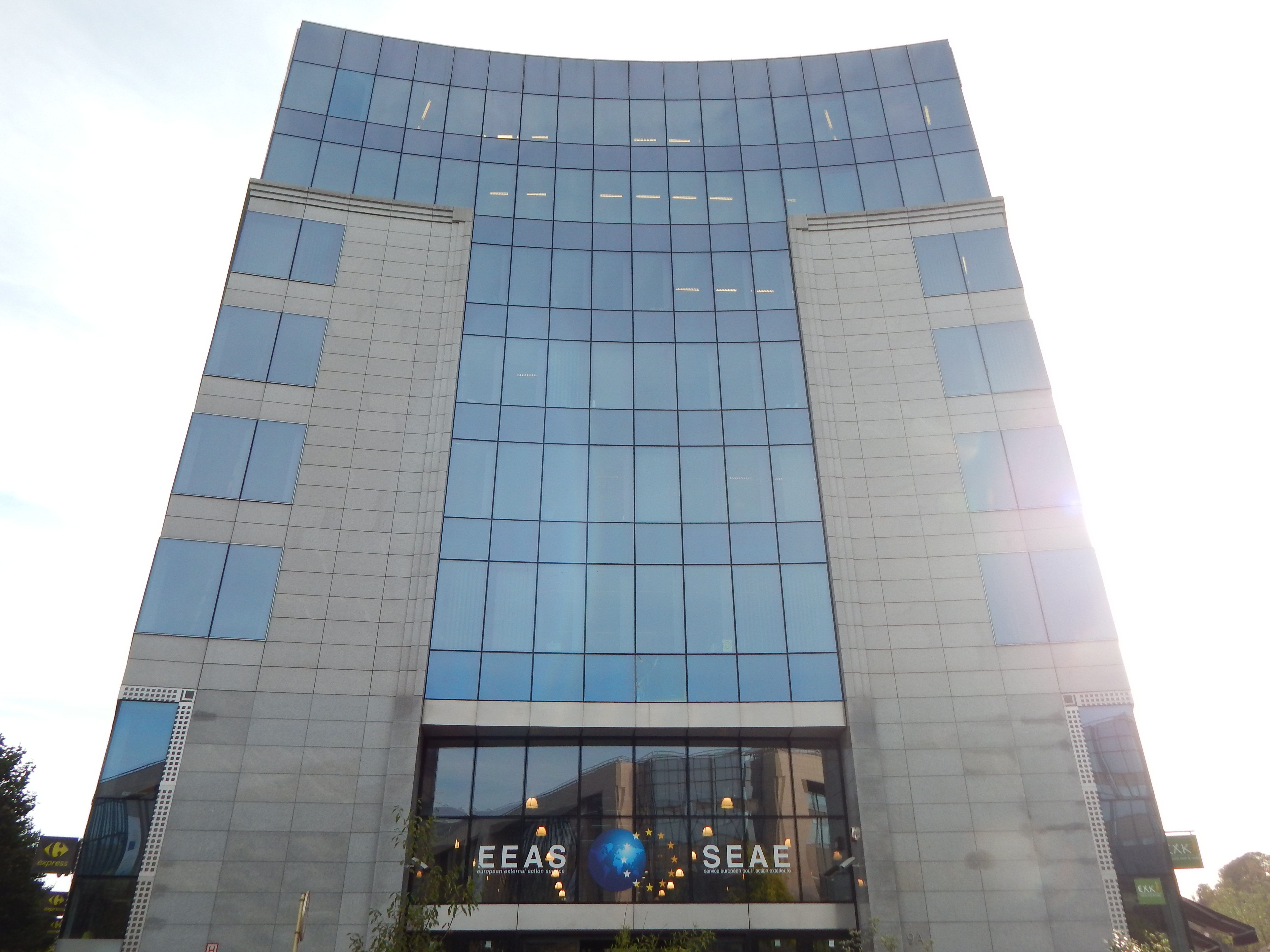 Façade du Triangle Building.